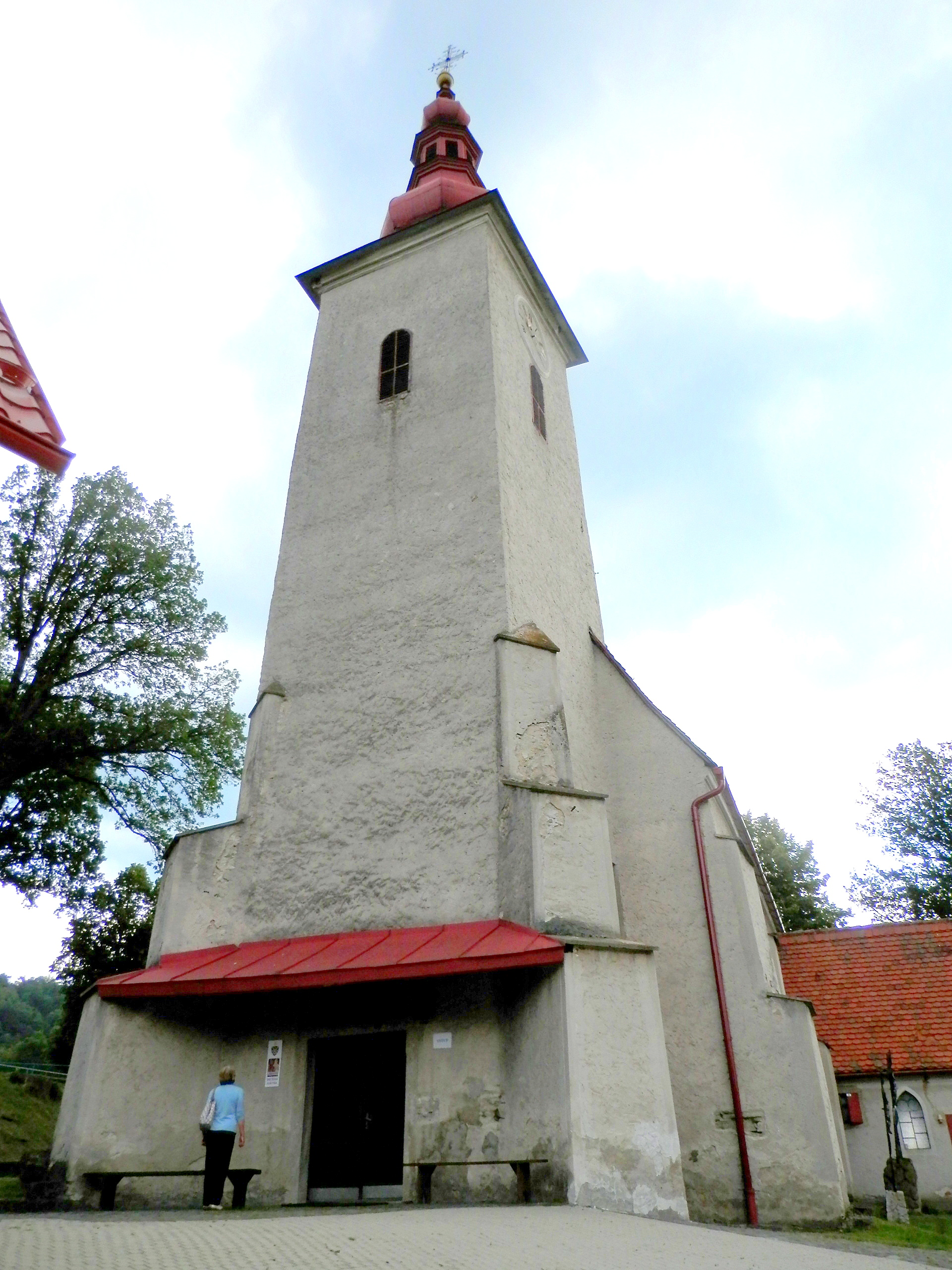 Pútnický, rímskokatolícky kostol svätého Vojtecha, doba vzniku rok 1384, prevládajúci sloh gotický. Obec Gaboltov okres Bardejov.